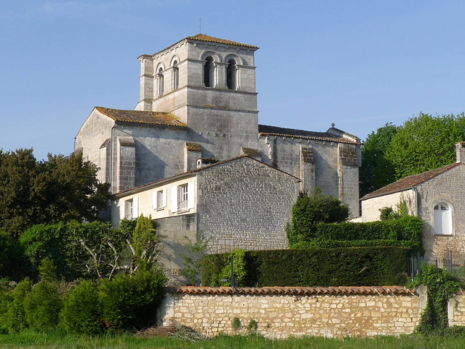 église de Graves, Graves-St-Amant, Charente, France